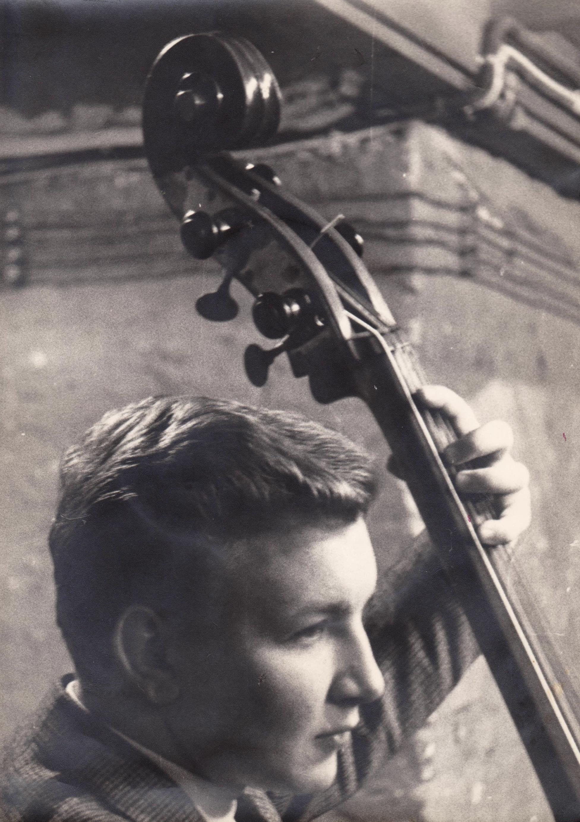 Robert Politzer in jüngeren Jahren am Kontrabass bei einer Probe.